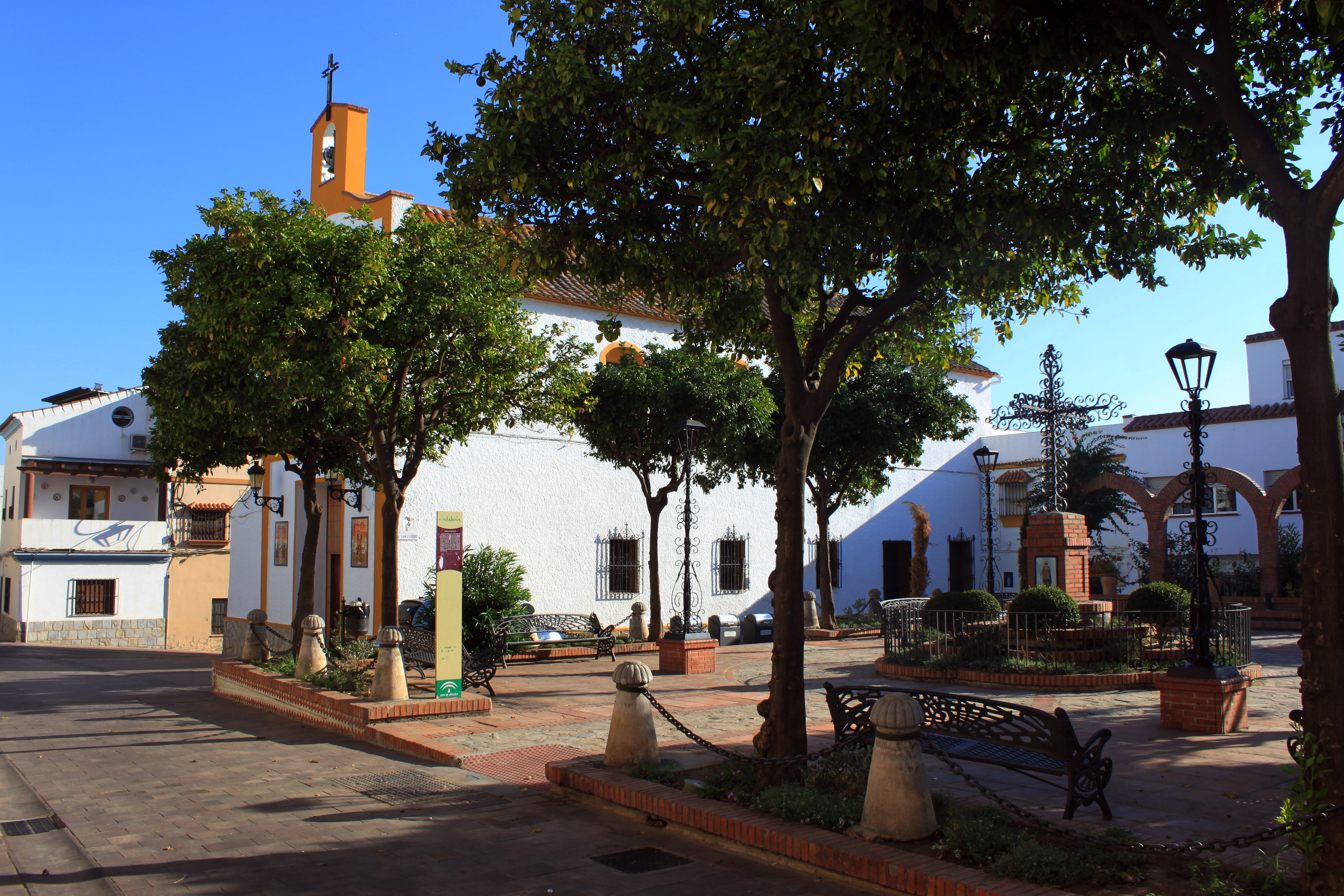 Imagen de la Plazoleta de San Isidro tras su reforma integral en 2019. Algeciras, España.